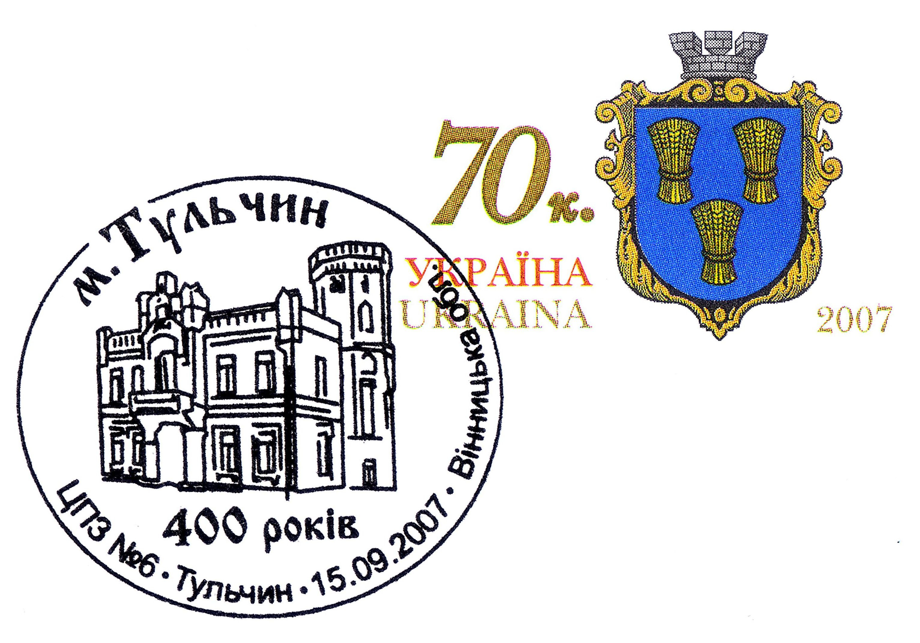 Original stamp. Ukraine, 2007, # ua180cvs.